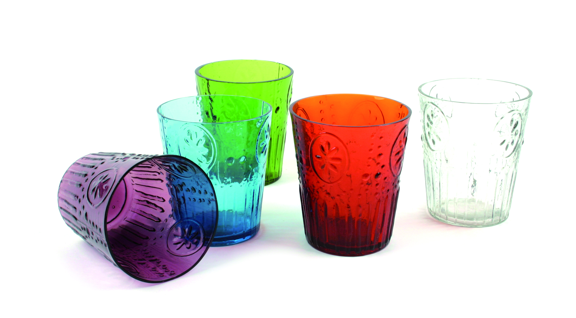 Kunsthandwerk aus Indien